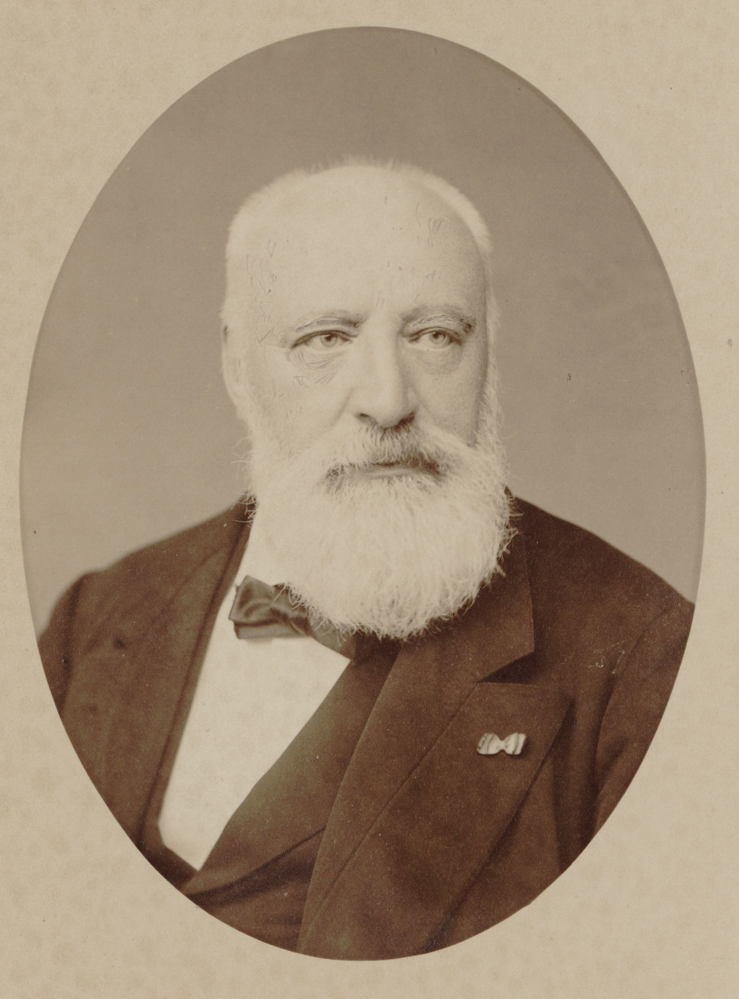 photographie de Victor Frédéric Verrimst